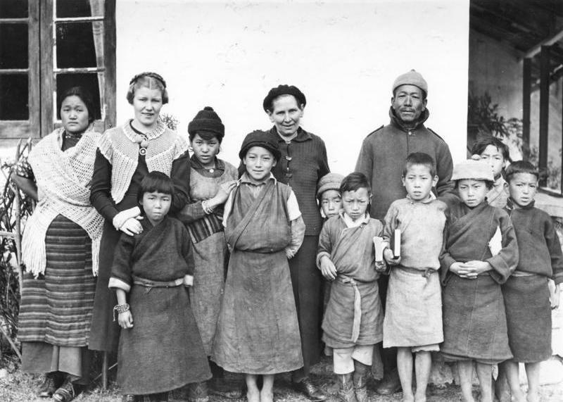 Tibetexpedition, Missionsschule in Lachen Lachen, Missionsschule (finnische Missionarin mit ihrer Gehilfin und dem Eingeborenen Pastor) [Missionarien mit Kindern] Information added by Wikimedia users.